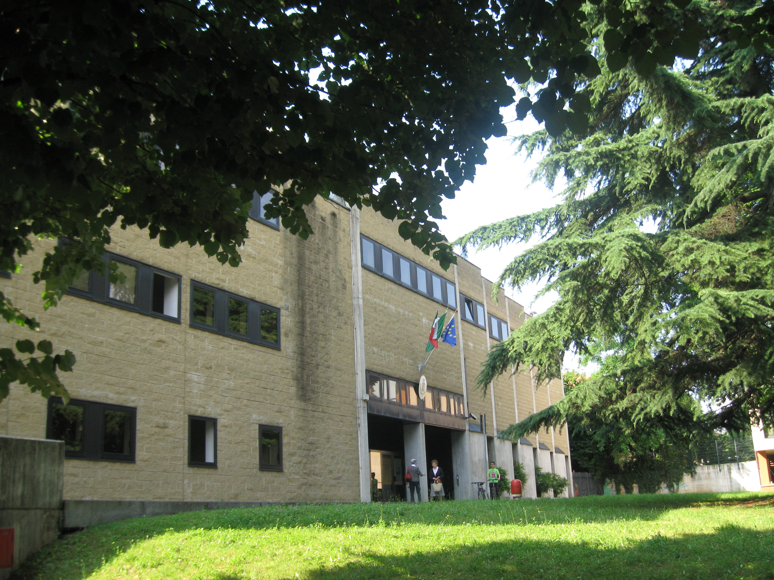 Nuova sede del Comune, Carate Brianza